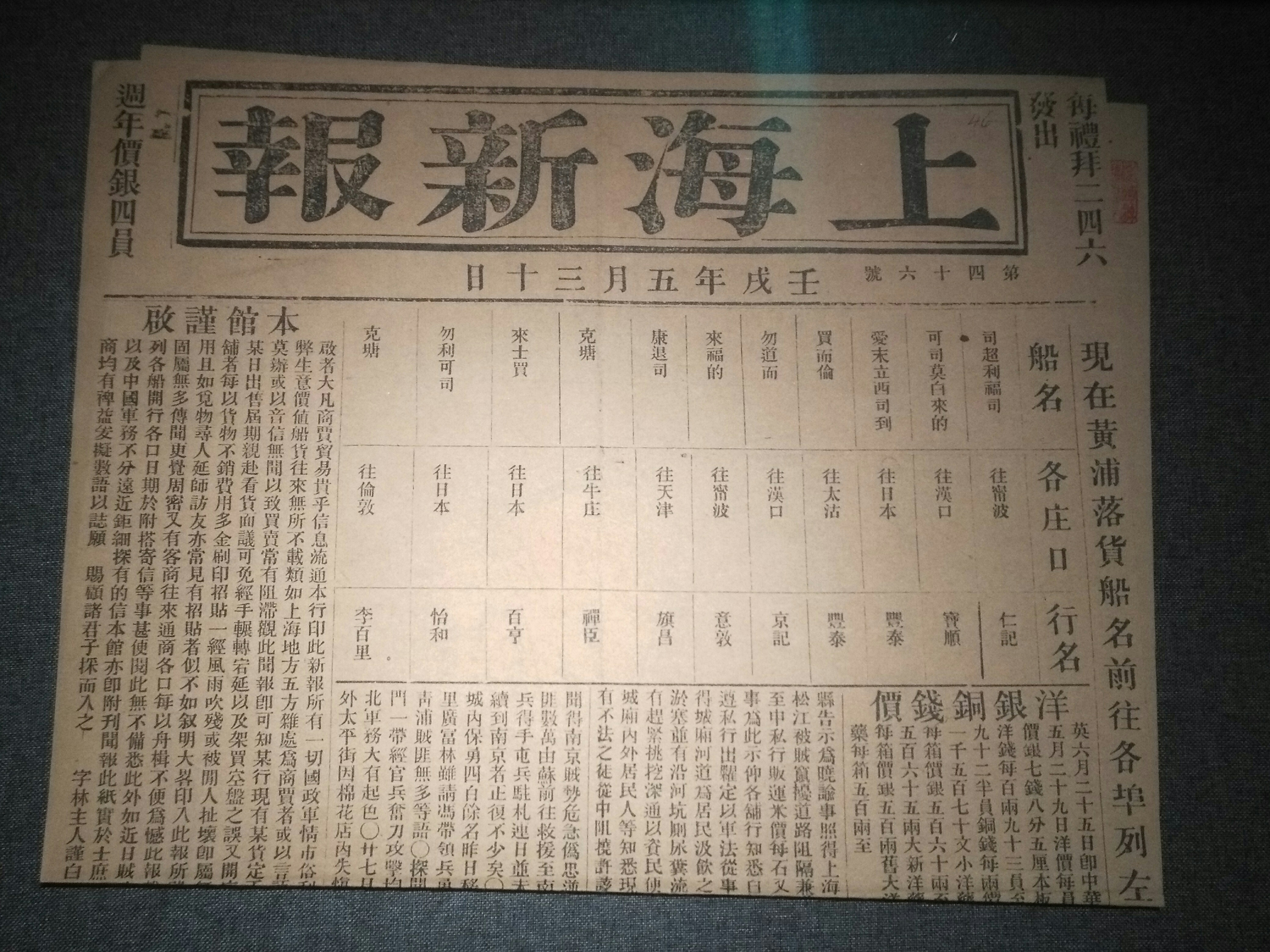 上海新报（1862年5月13日，自当日起每周三版，此为第一期每周三版的报纸），展出于上海市历史博物馆